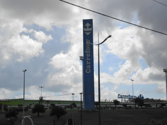 Carrefour Natal em Natal, Rio Grande do Norte, Brasil